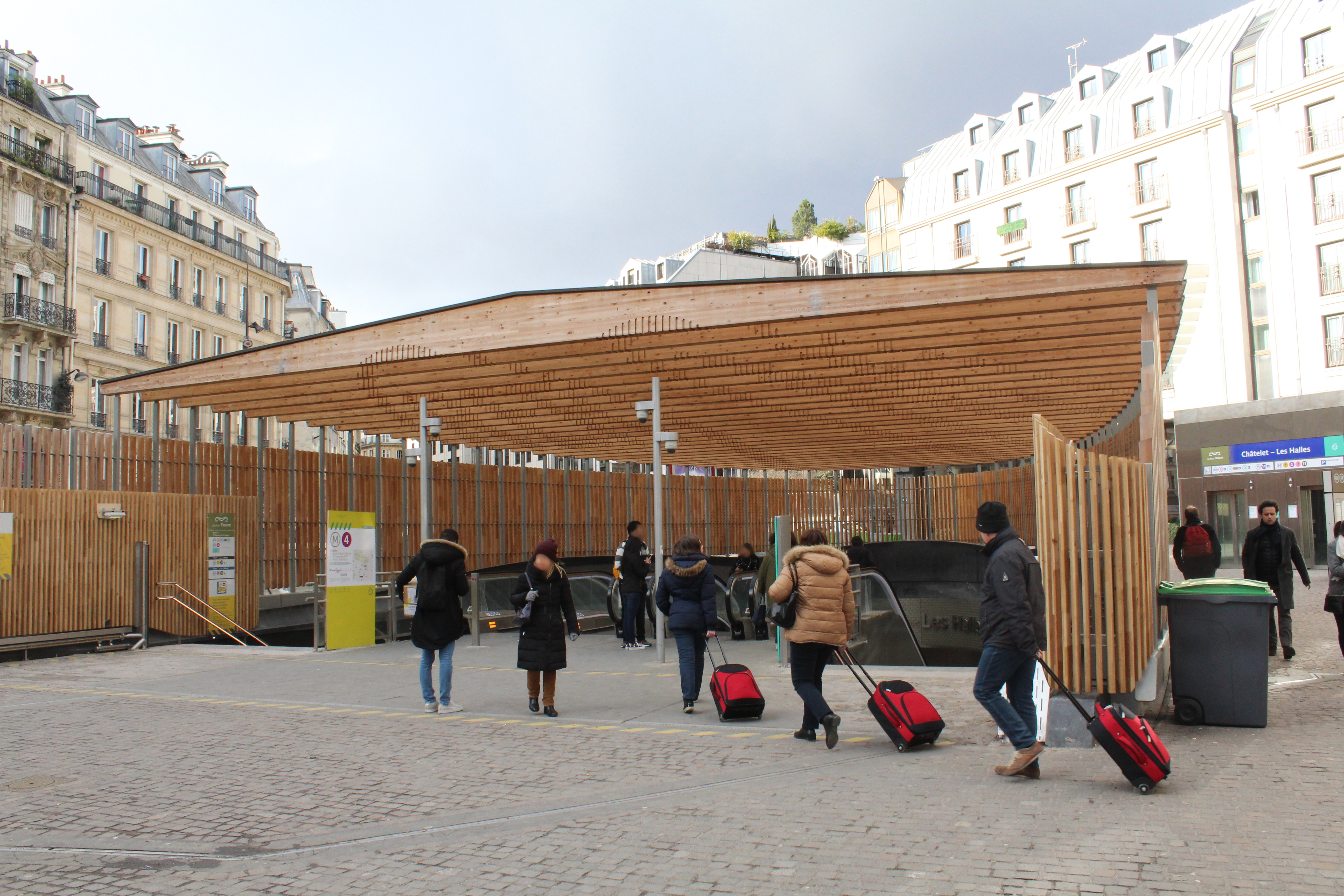 Entrée dans la gare Châtelet - Les Halles, place Marguerite-de-Navarre, Paris.